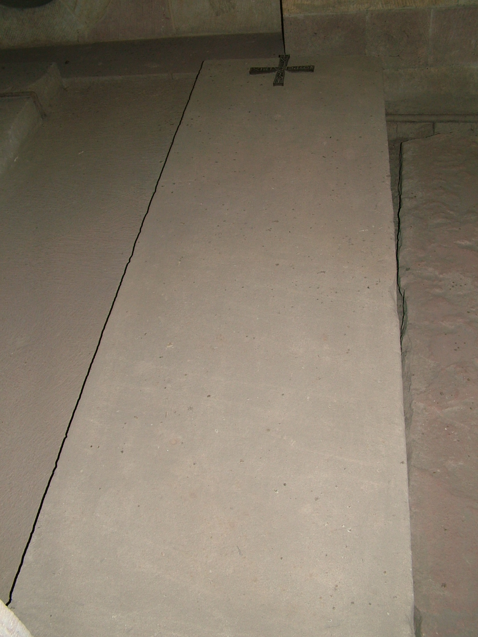 Grab der Gisela von Schwaben